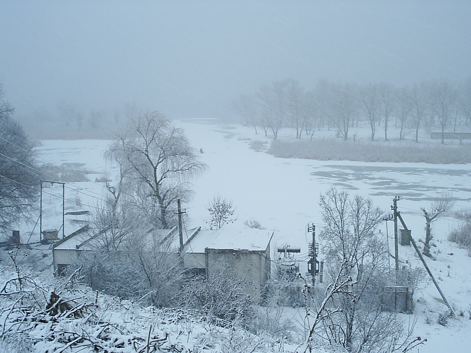 Зимний остров